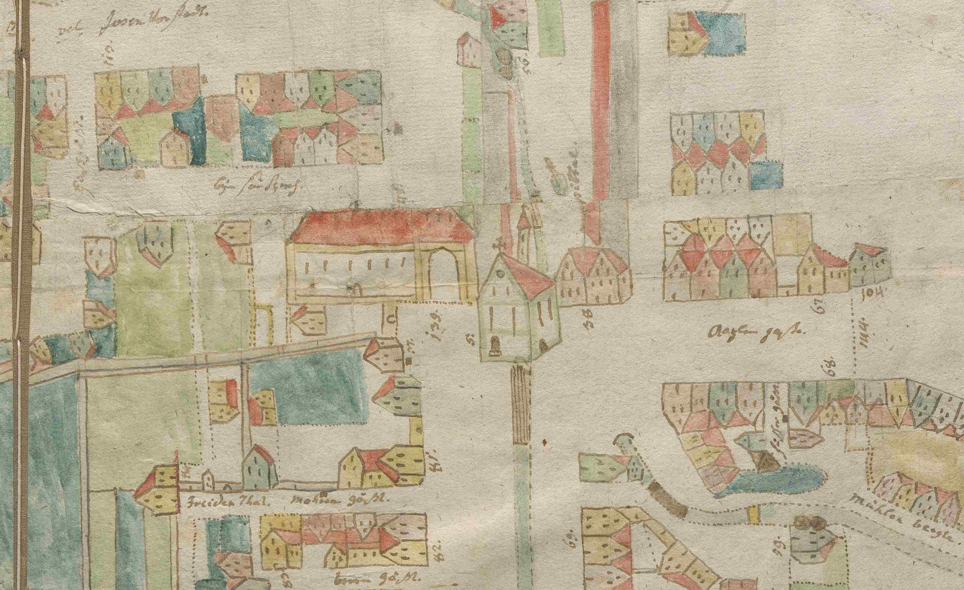 Schwäbisch Gmünd, Unterer Marktplatz mit abgegangener Kapelle des Hospitals zum Heiligen Geist